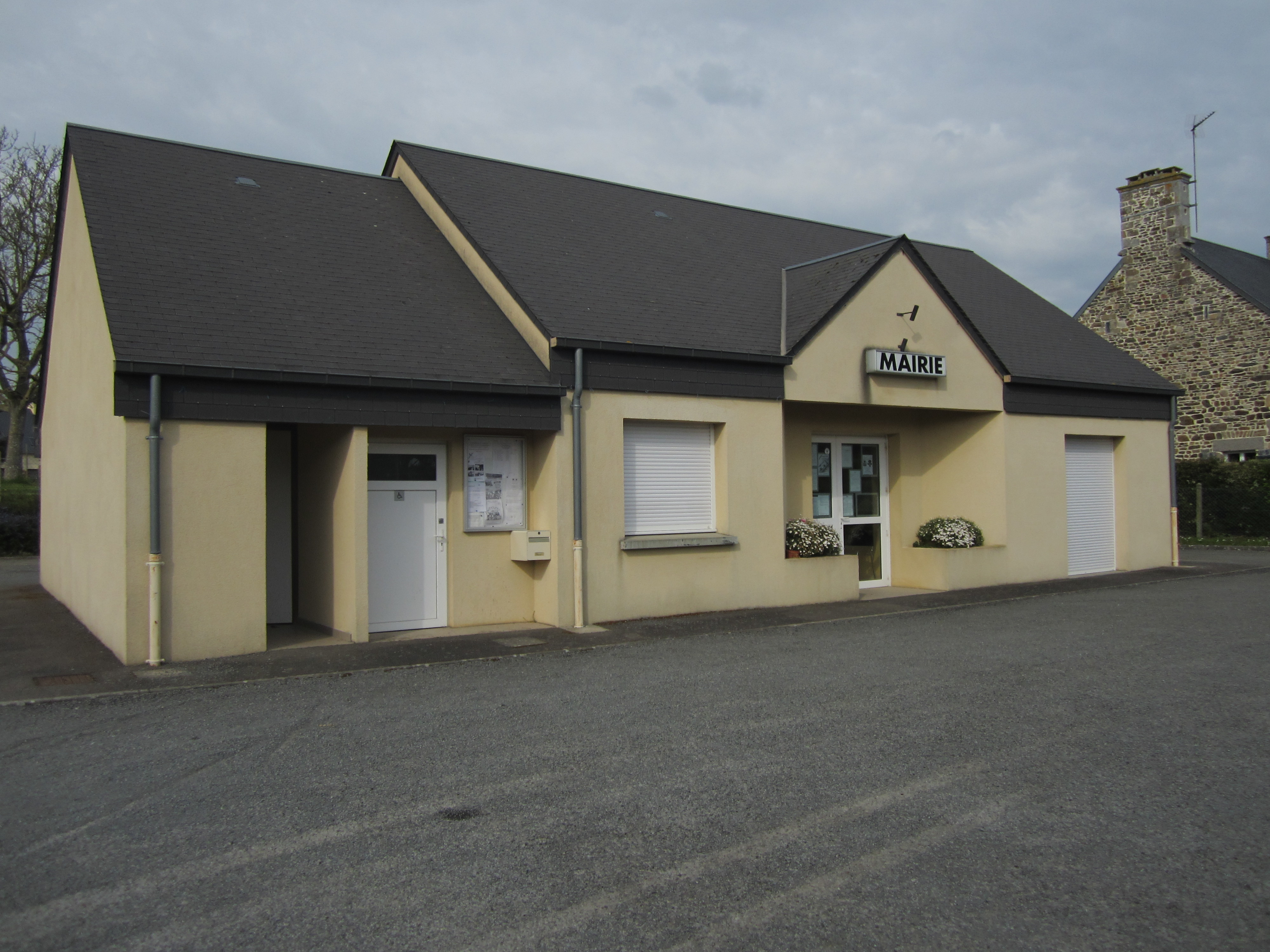 Champcey, Manche